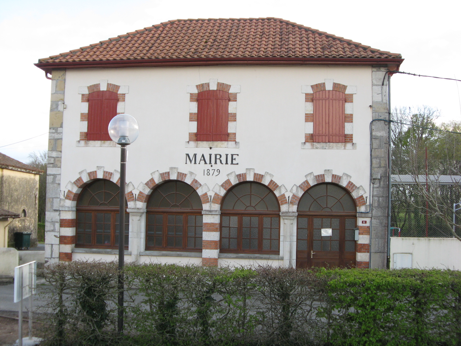 Mairie de Biaudos (Landes (département)) (Pyrénées).